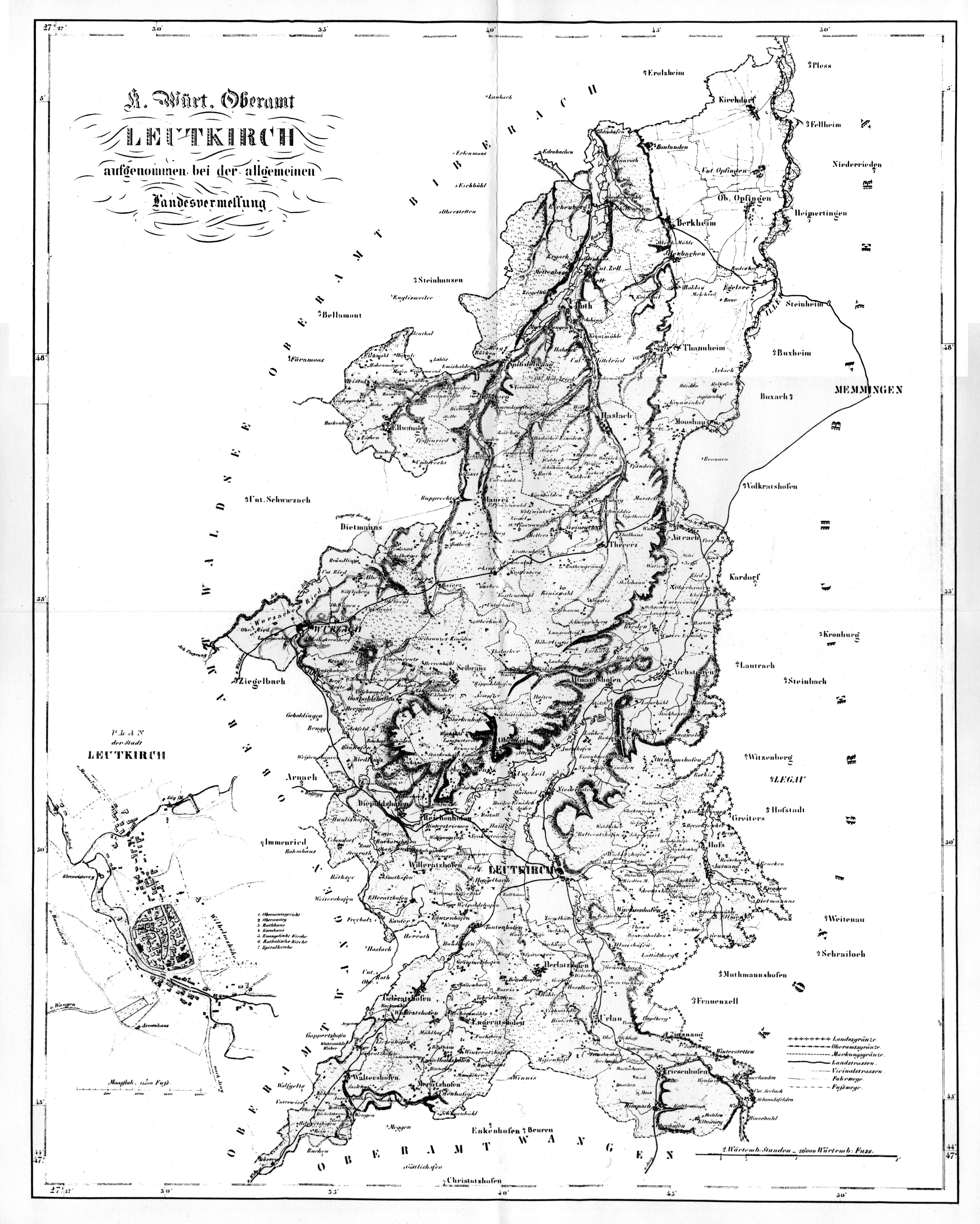 Karte des Oberamts Leutkirch, Beilage zu: Beschreibung des Oberamts Leutkirch